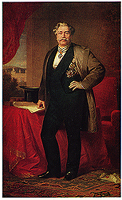 Friedrich von Kühlwetter, preußischer Staatsmann und Oberpräsident von Westfalen.